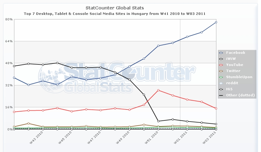 Az iWiW részesedésének drasztikus csökkenése 2011 januárjában a StatCounter hibás mérése szerint.